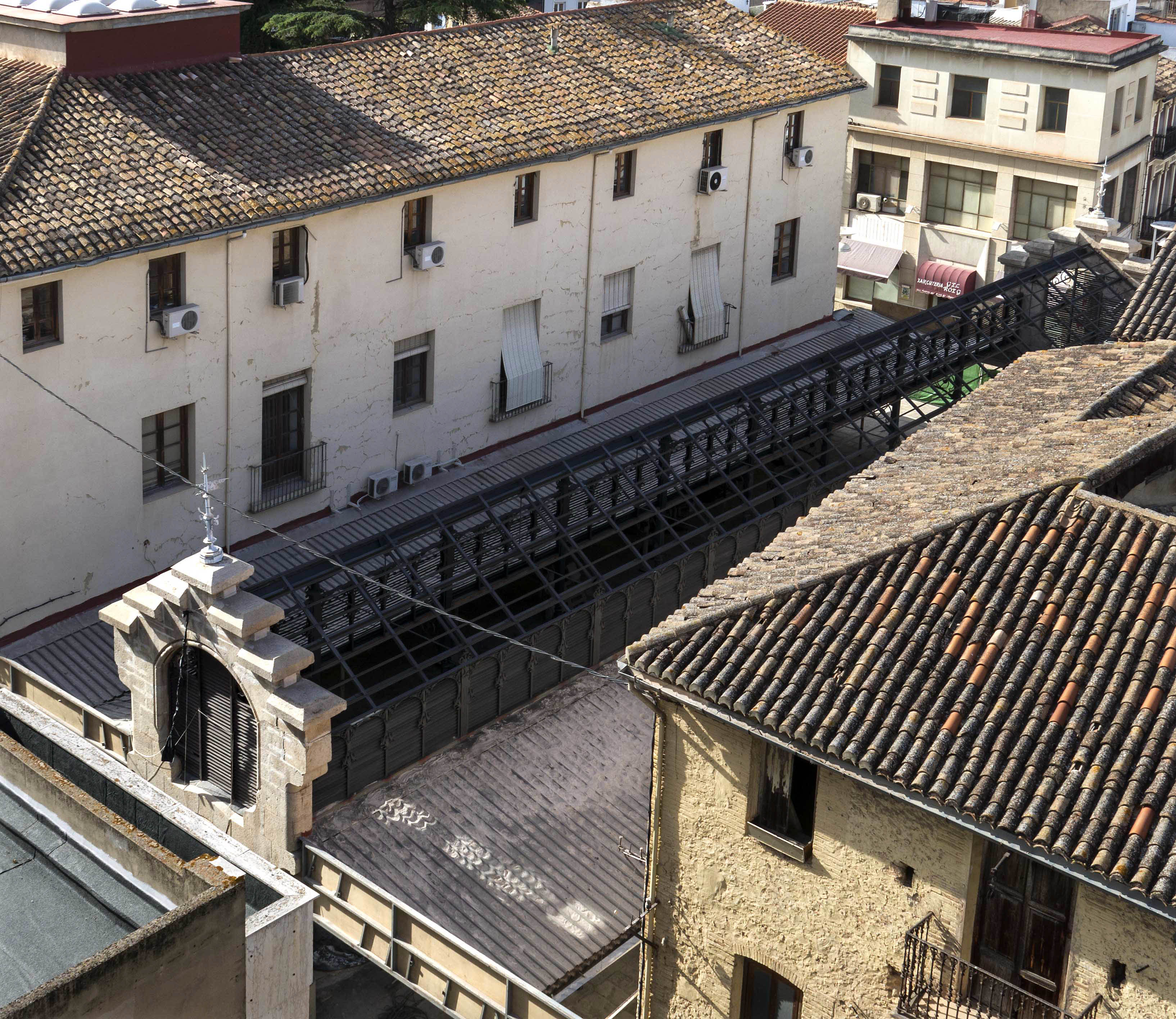 El mercat d'Alginet va ser projectat per l'arquitecte Carles Carbonell, nascut a Barcelona el 01-11-1873. L'arquitecte Carbonell va ser corresponsal de l'Anuari de l'Associació d'Arquitectes de Catalunya. A Alginet han quedat dues obres emblemàtiques: el mercat i l'escorxador. La Caserna de la Guàrdia Civil d'Alginet projectada per ell va ser enderrocada. A més, es conegut per la seua obra pública a València: en 1905 el Campanar de l'església de Sant Sebastià i el Projecte de la façana principal de l'Ajuntament de València; en 1908 el Saló Actes i Concerts Exposició Regional, i també el Pavelló Palau Foment Exposició Regional. En urbanisme destaquen l'obertura de l'avinguda de l'Oest, l'ampliació de la plaça de la Reina, etc. Actualment (juliol de 2017) el mercat està en reformes.